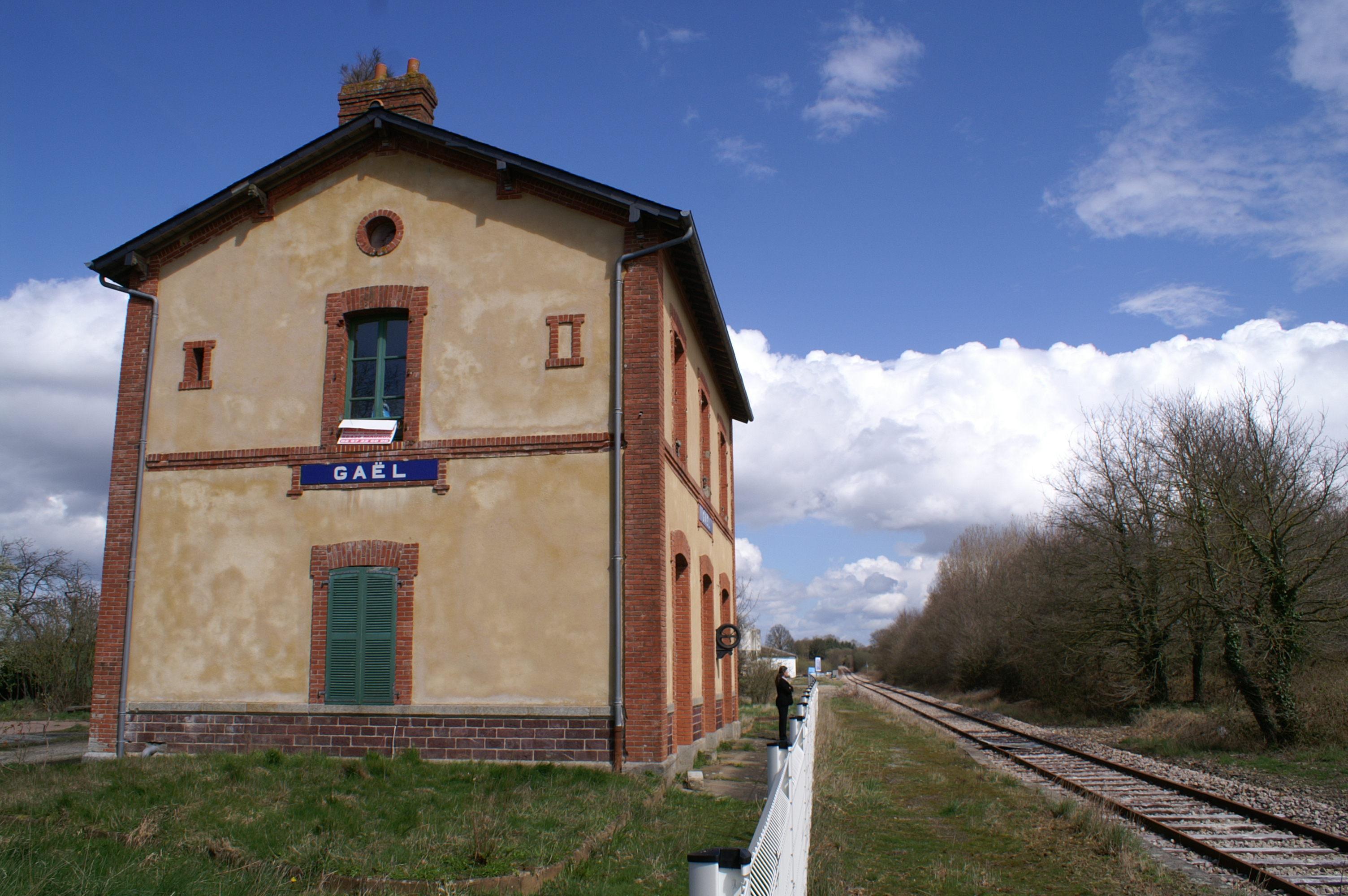 L'ancien bâtiment voyageurs de la gare de Gaël est à vendre, mais la voie vient d'être remise en état pour un trafic de fret.